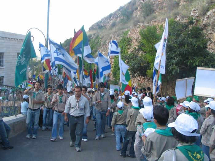 תלמידי בתי ספר דרוזיים משתתפים במצעד המרכזי של הצופים הדרוזים אל קבר יתרו (נבי שועיב) עליו השלום.